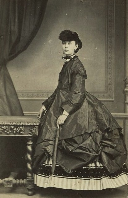 Мария Александровна Сольская, ур. Мясоедова (1840—1914)